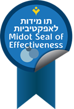 תו מידות לחיים בפלוס